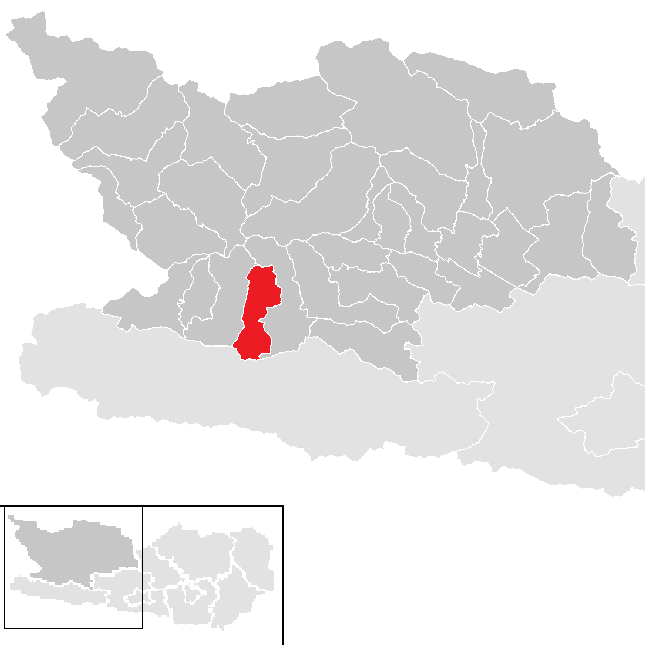 Bezirk Spittal an der Drau